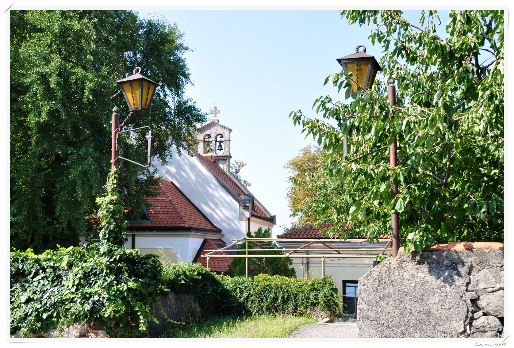 Lipica (65)